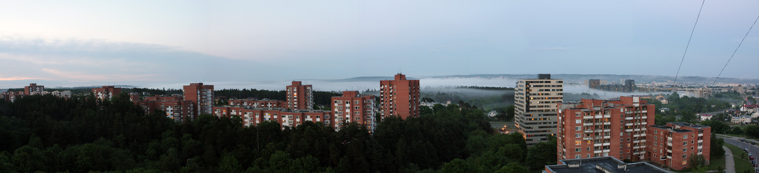 Vilniaus panorama žiūrint iš Baltupių. Slenka rūkas.